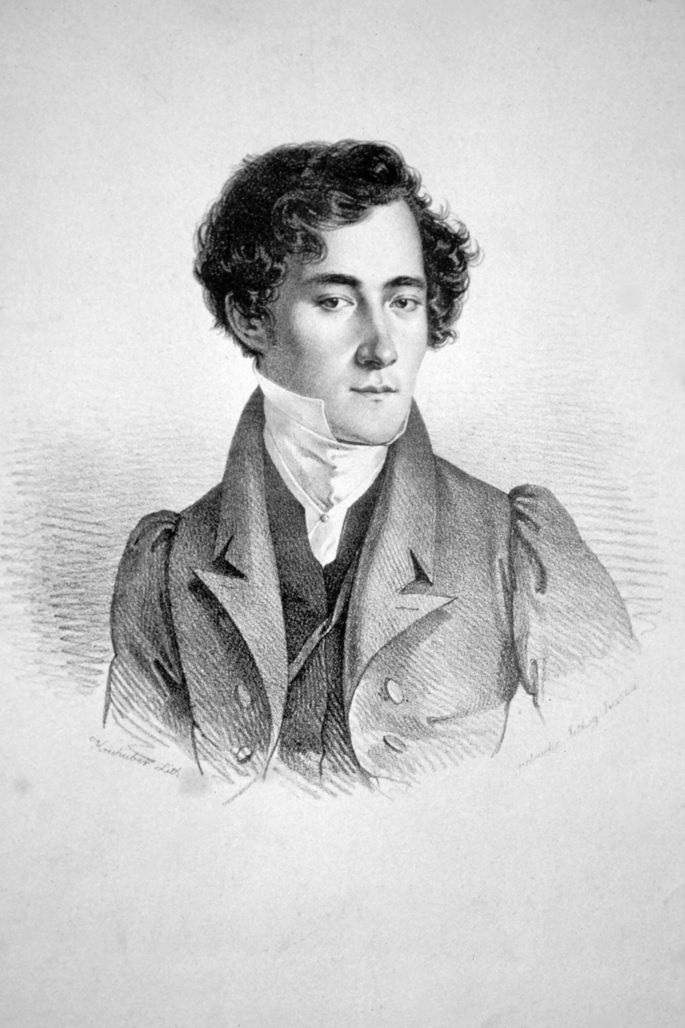 Johann Hoffmann (1802-1865) österreichischer Sänger und Theaterdirektor.